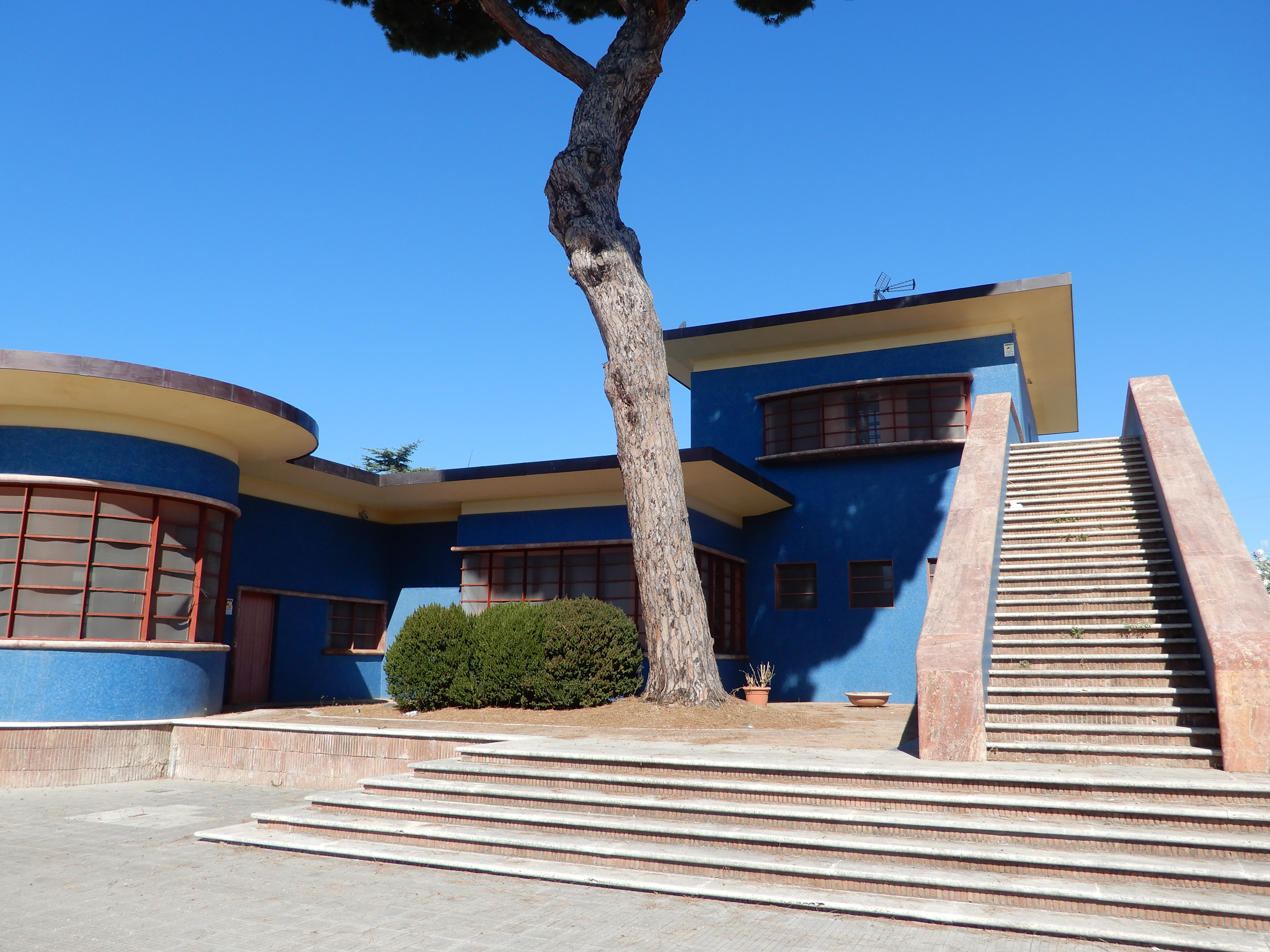 Palazzo delle Poste di Sabaudia